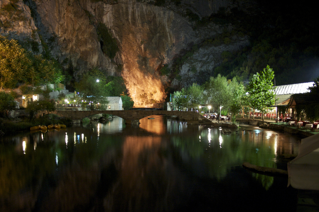 Blagaj, Bosnia